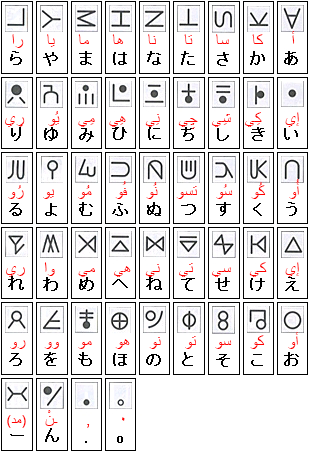 المقطعيّات المُستخدمة في القناص. ملف الـPSD موجود في com/?RVrMoe